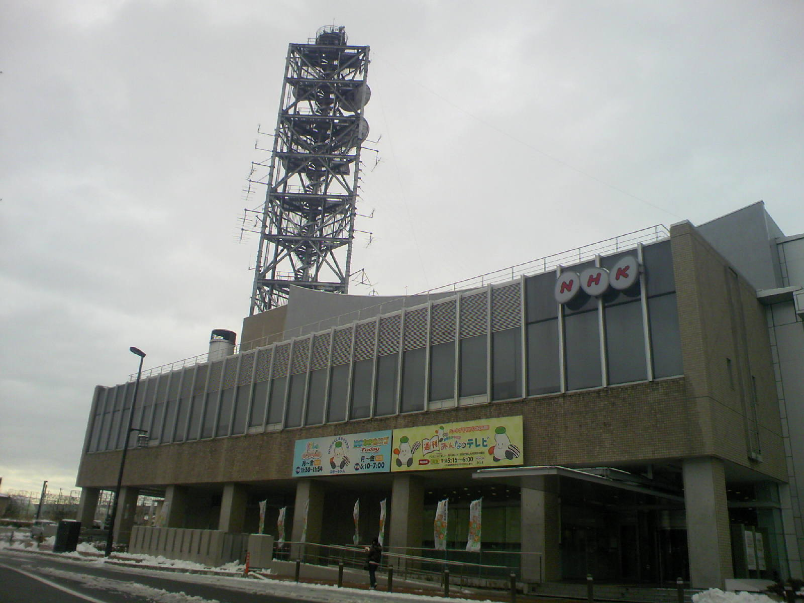 NHKFukushima NHK福島放送局